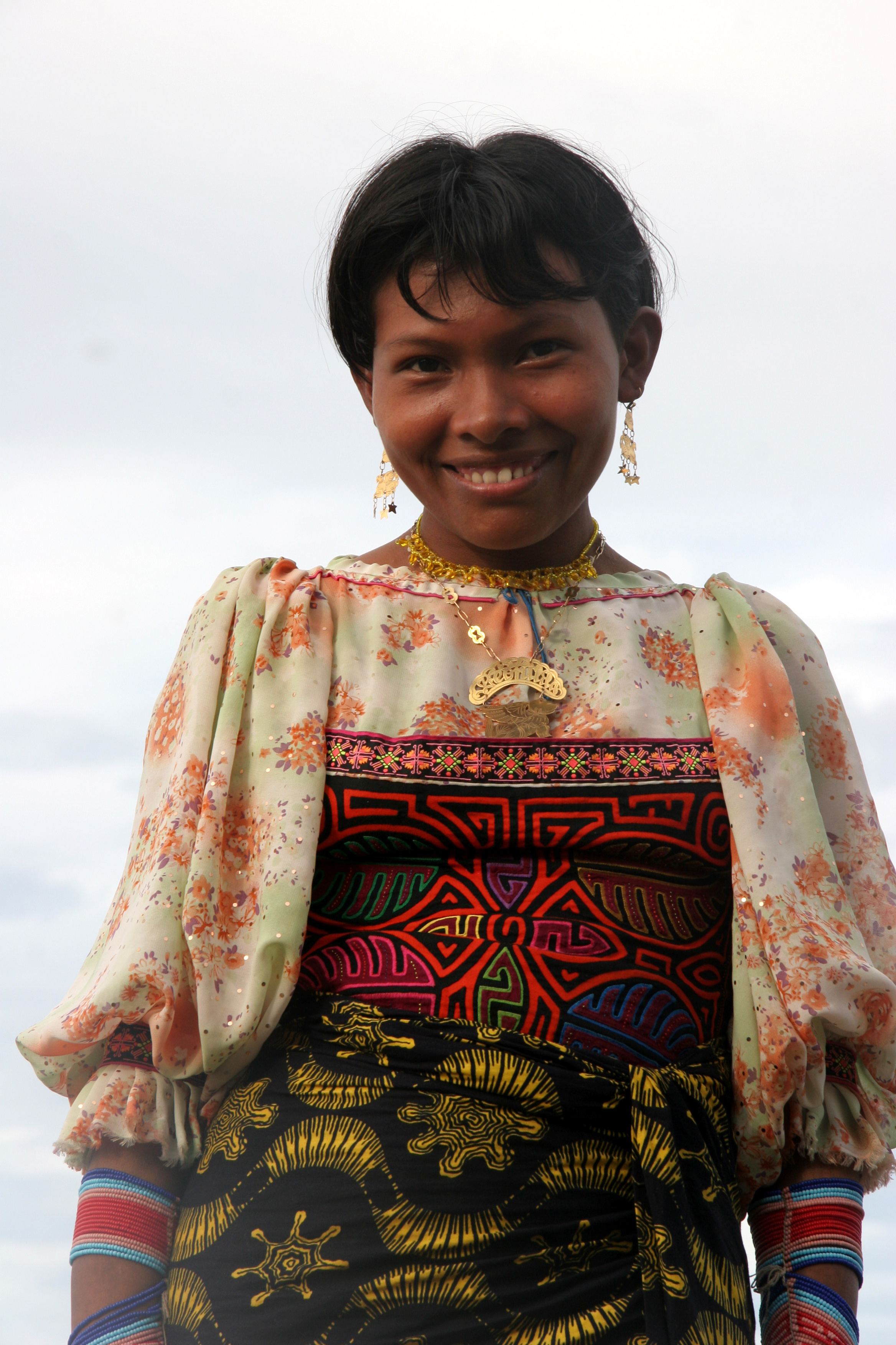 panama, iles des San Blas, jeune femme Kuna